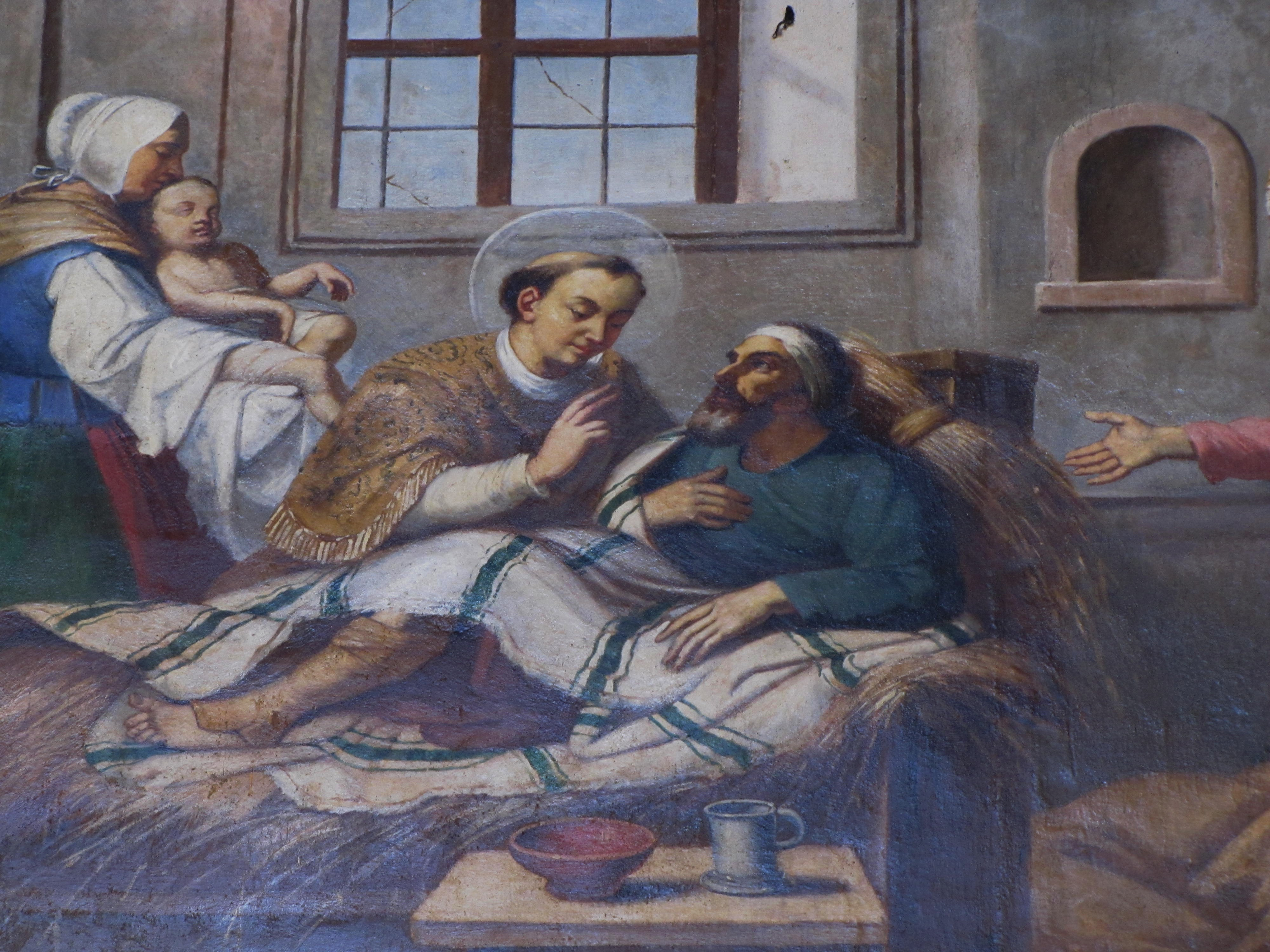 Alsace, Bas-Rhin, Altorf, Église abbatiale Saint-Cyriaque (PA00084581, IA67011108). Peinture monumentale de la nef "Saint Cyriaque soulage les pauvres et guérit des malades et paralytiques" (Ignace SCHOTT, fresque, 280cm de large, XVIIIe-XIXe)